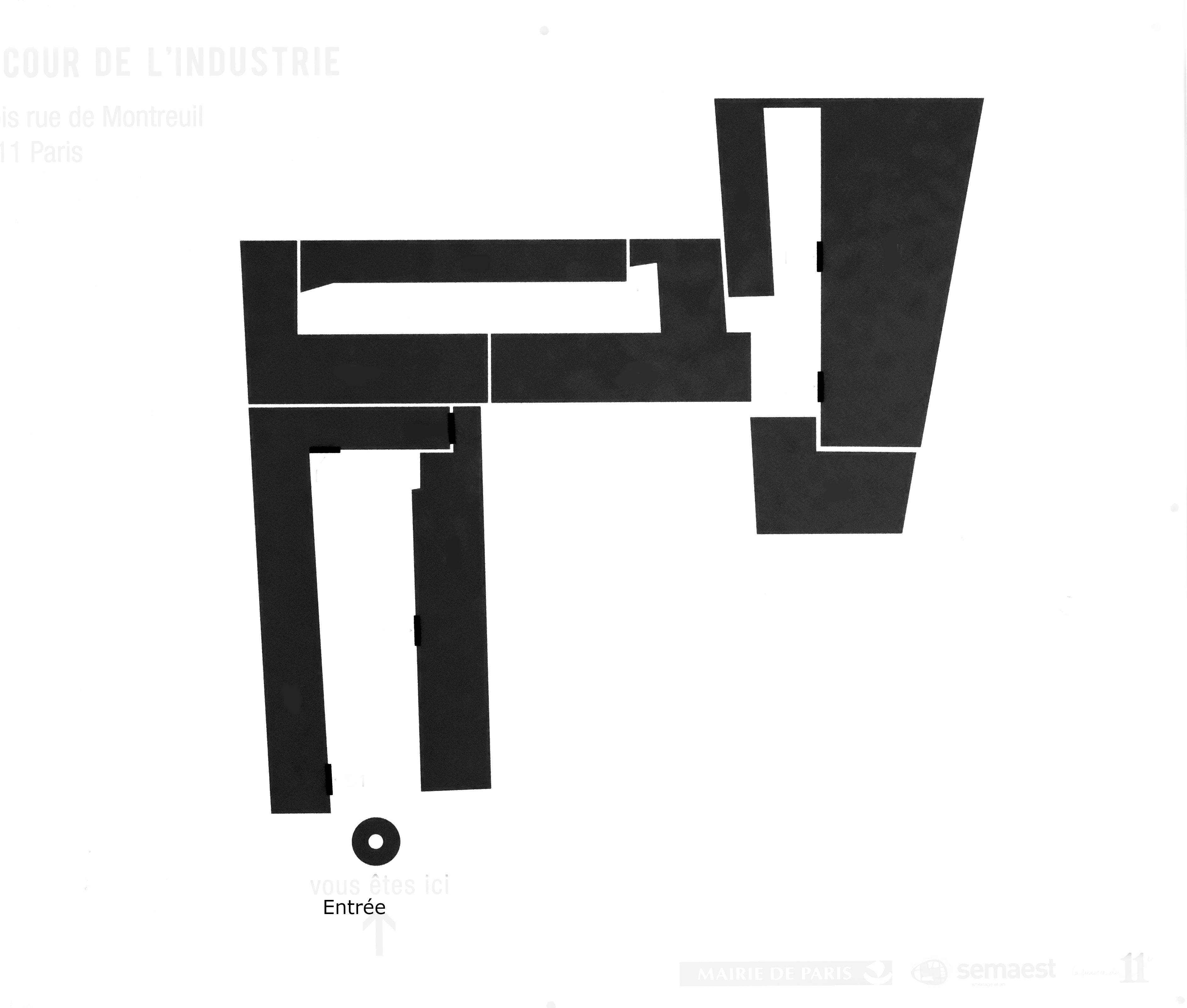 Paris XI - Plan de la Cour de l'Industrie (entrée 37bis rue de Montreuil).